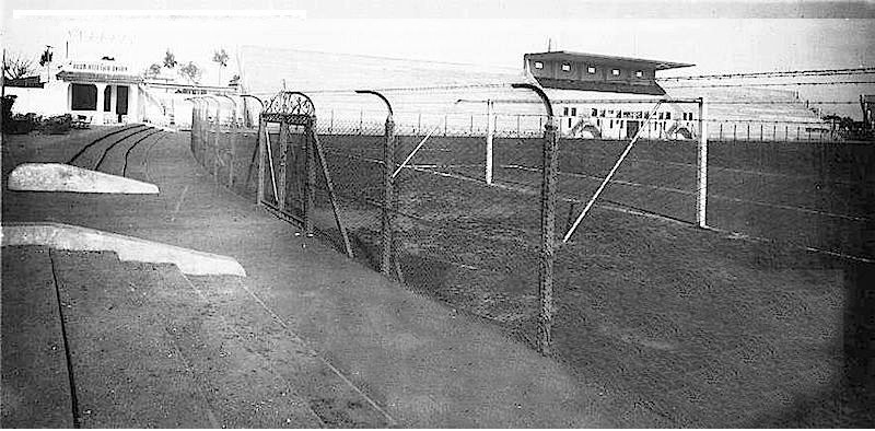 Estadio de Unión de Santa Fe en 1930